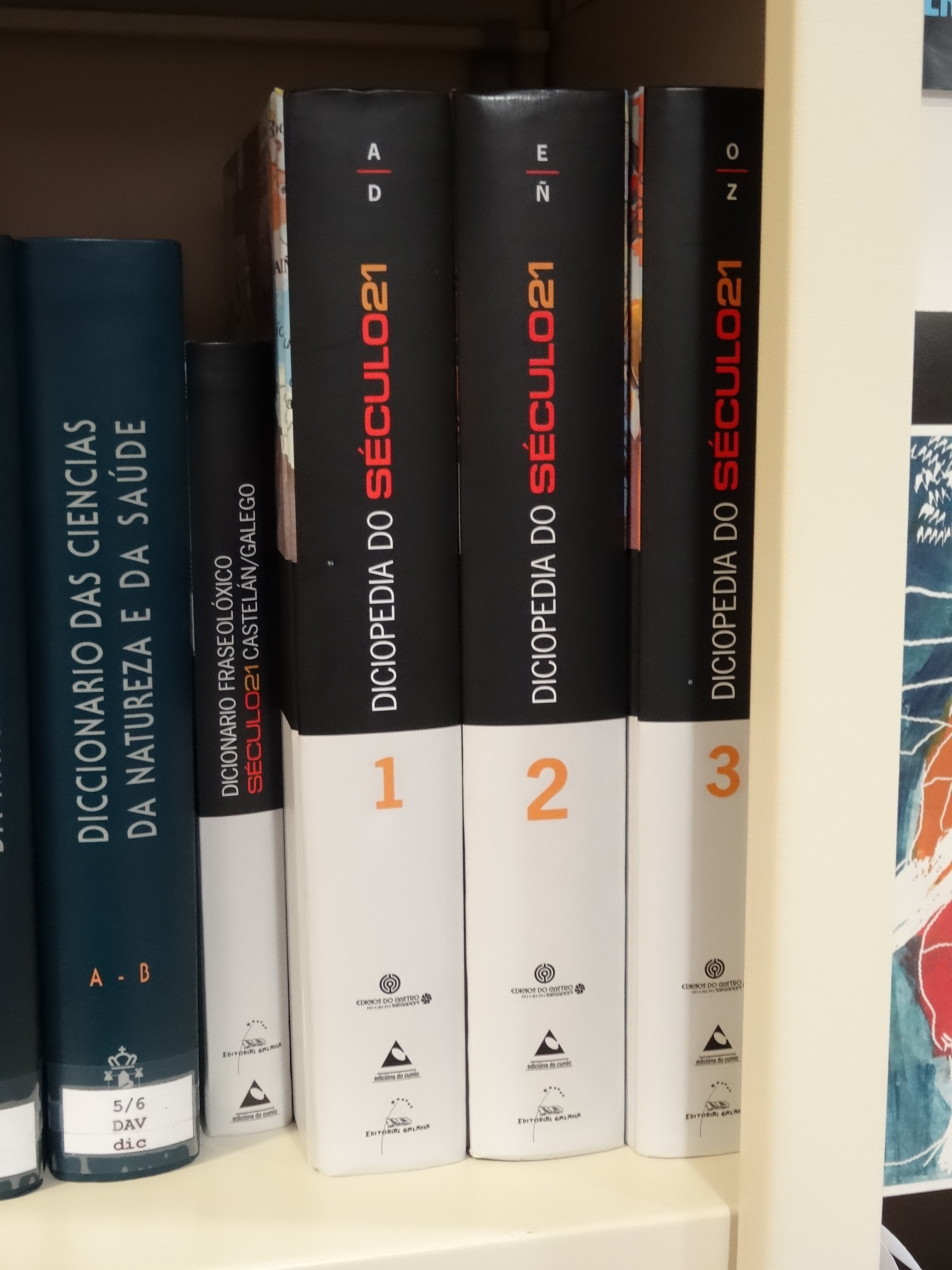 Diciopedia do Século 21.